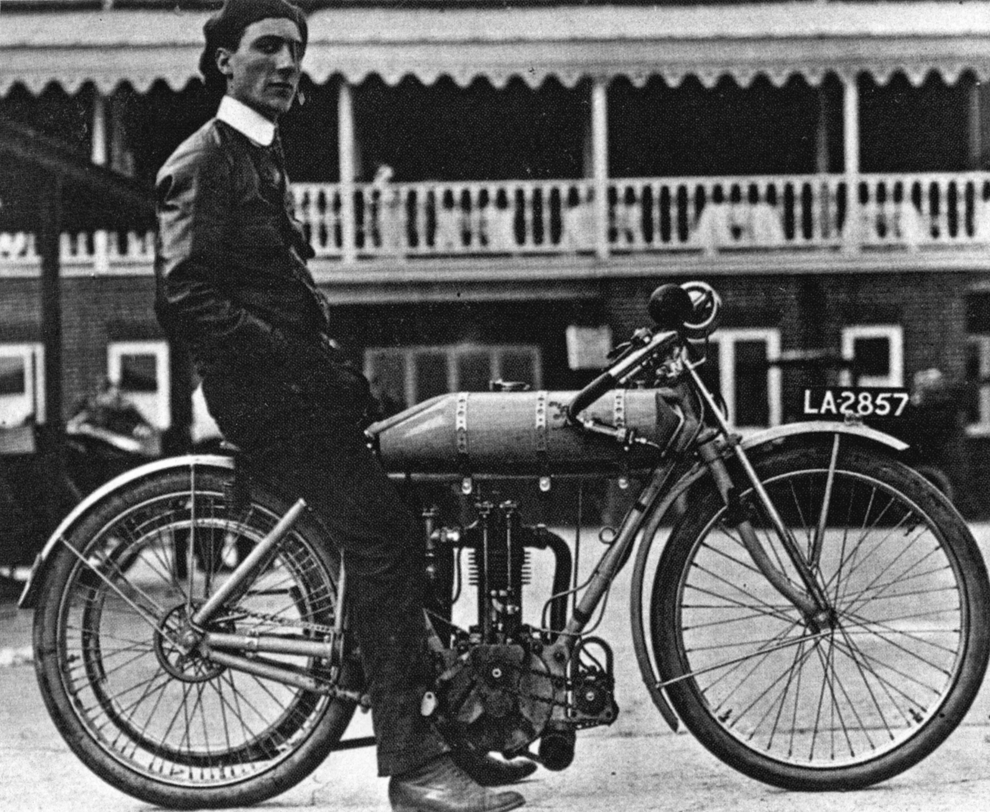 Bat Motorrad im Jahr 1910. Mit diesem Motorrad wurde 1910 ein neuer Bahnrekord mit über 80 Km/h bei der Tourist Trophy aufgestellt